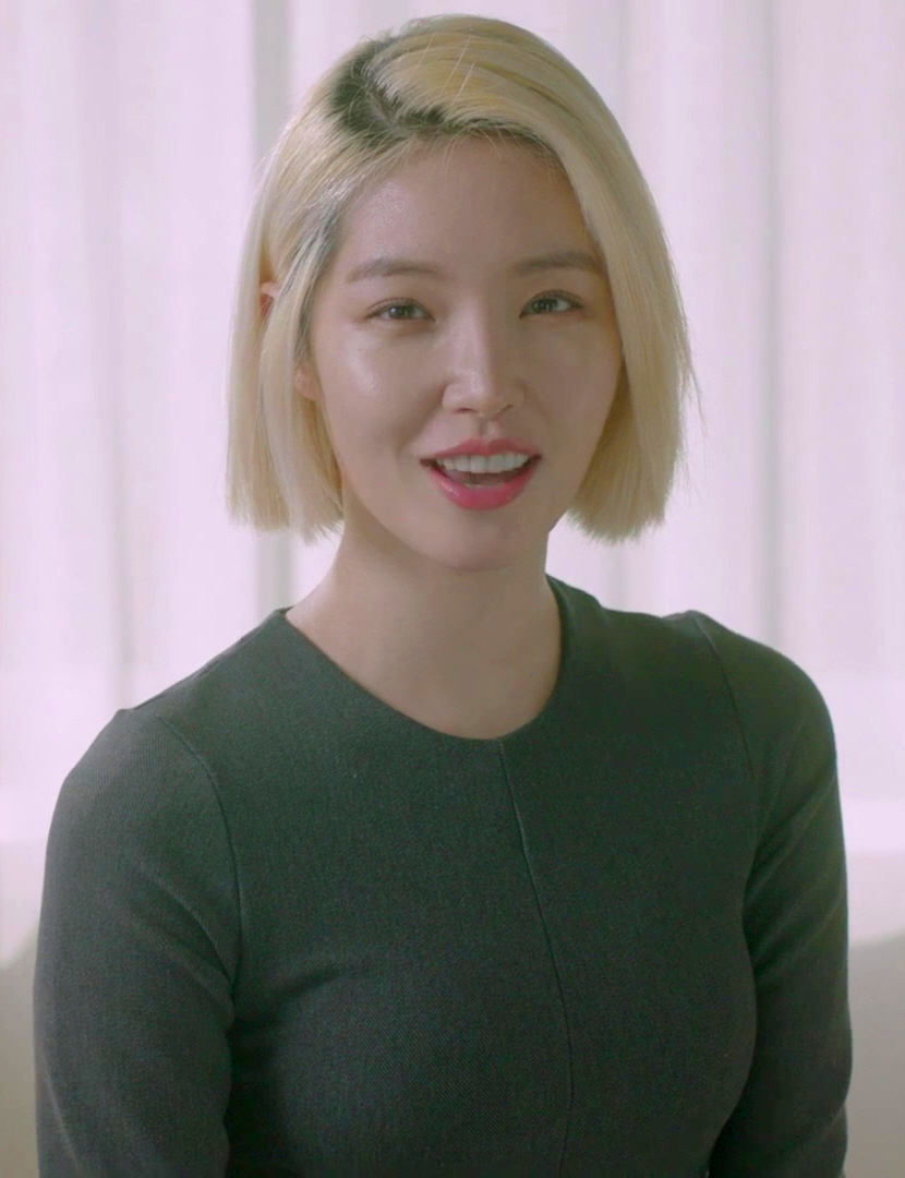 (Marie Claire Korea) 김새롬의 pH 밸런스 실험실